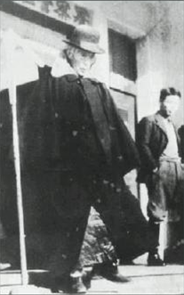 Park Jungyang 1949